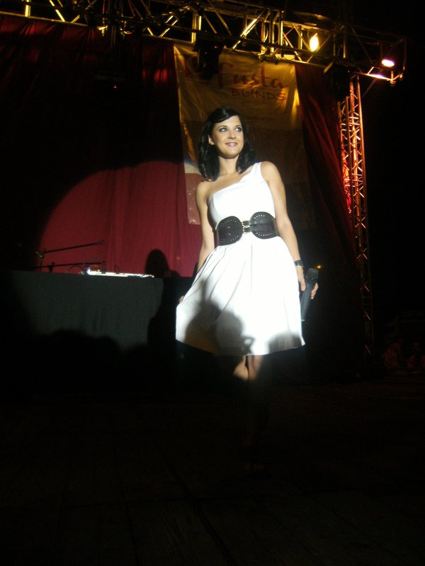 Virginia Maestro en Silla (Valencia) el 7 de agosto de 2009.